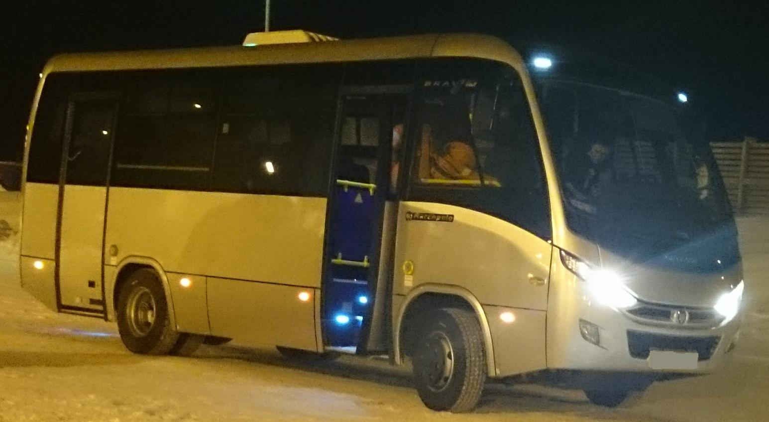 Kamaz Marcopolo Bus